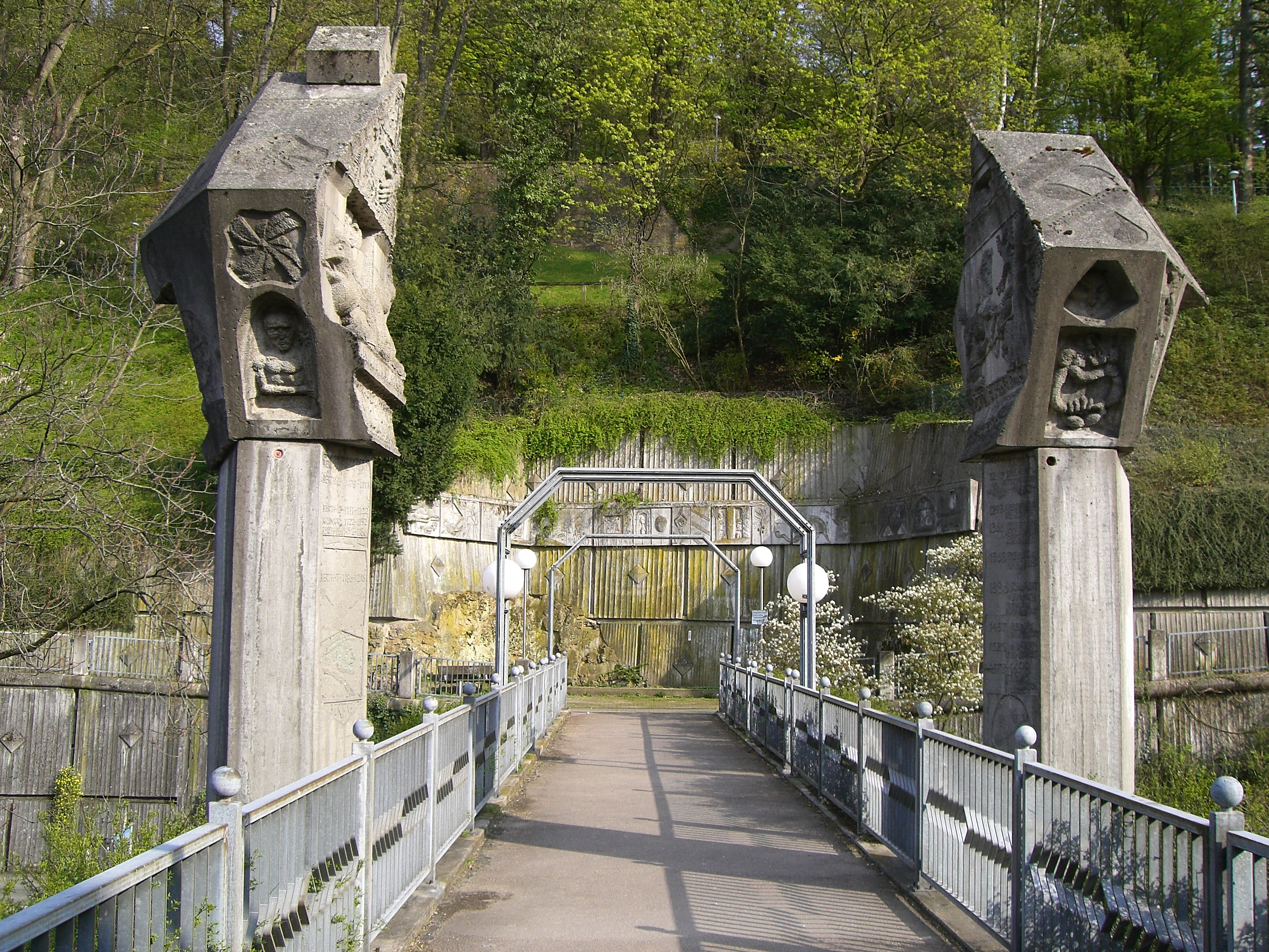 Blick Schlossbergsteg Richtung Schlossberg auf dem für Fussgänger vorgesehenen Stegbereich. Betonreliefs wurden vom Künstler Emil Wachter erstellt. - OpenStreetMap(Info)